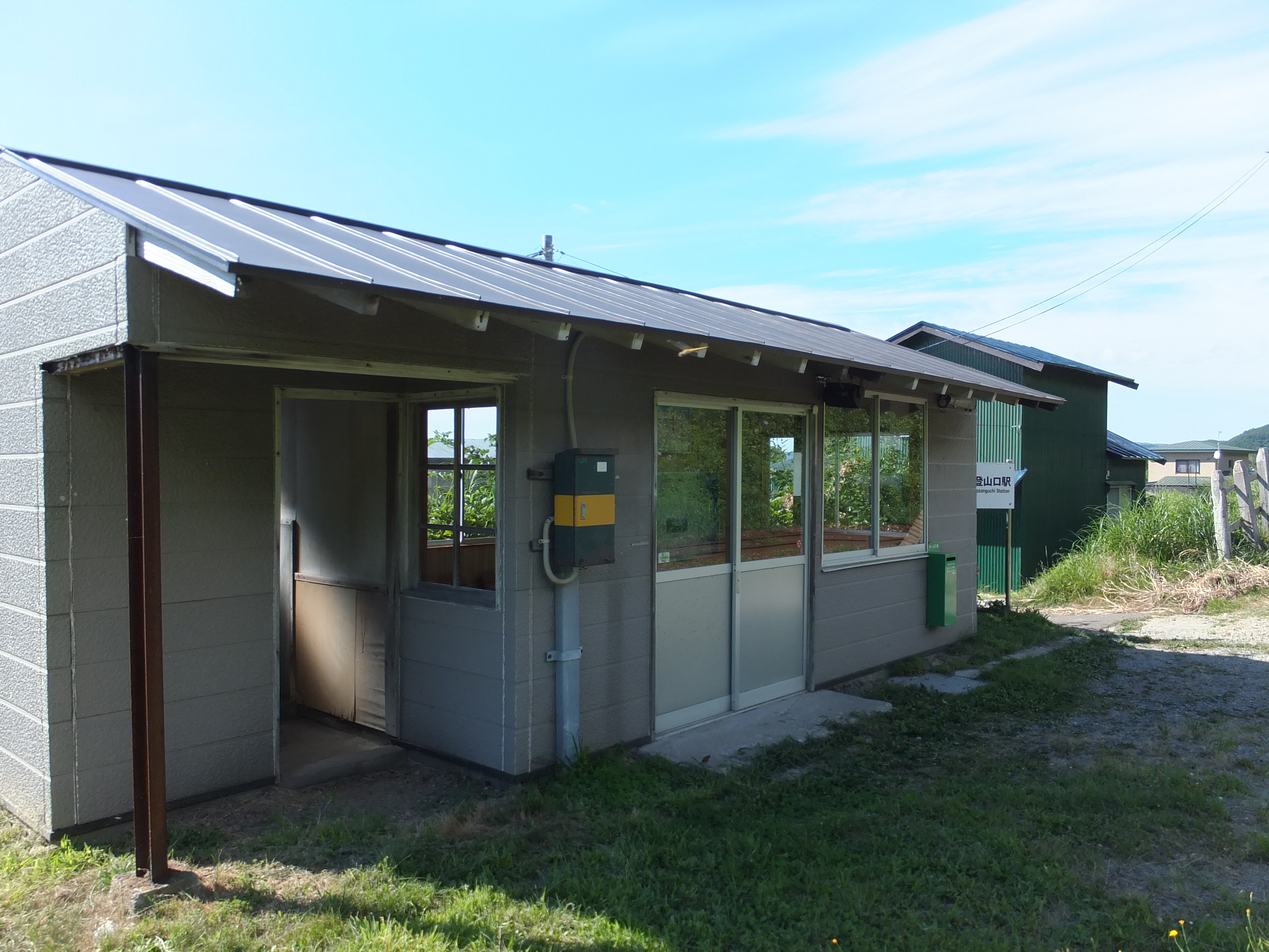 五能線 白神岳登山口駅（青森県西津軽郡深浦町）